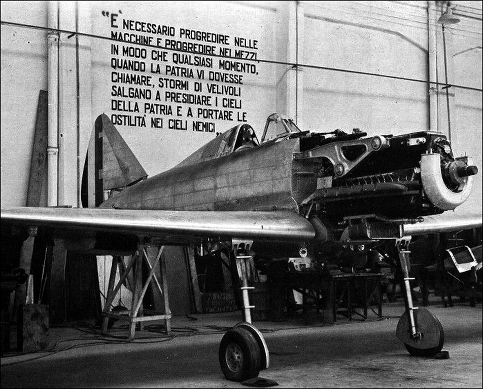 Primo prototipo dell'aereo da caccia RE 2001 costruito dalle Officine Meccaniche Reggiane. Alle spalle dell'aereo, proclama di Benito Mussolini alle Officine Meccaniche Reggiane (azienda rilevata dal gruppo Fantuzzi e recentemente acquisita dalla Terex). Riproduzione digitale dal volume: S. Govi, Il caccia RE 2001 - Storia degli aerei Reggiane, Milano, Apostolo Editore, 1982, p. 10 (Istituto per la storia della Resistenza e della società contemporanea - Reggio Emilia, Materiale fotografico Seconda Guerra Mondiale, 1940)